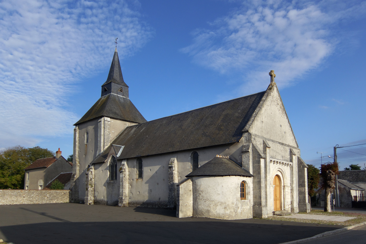 Église Saint-Saturnin de Conan .